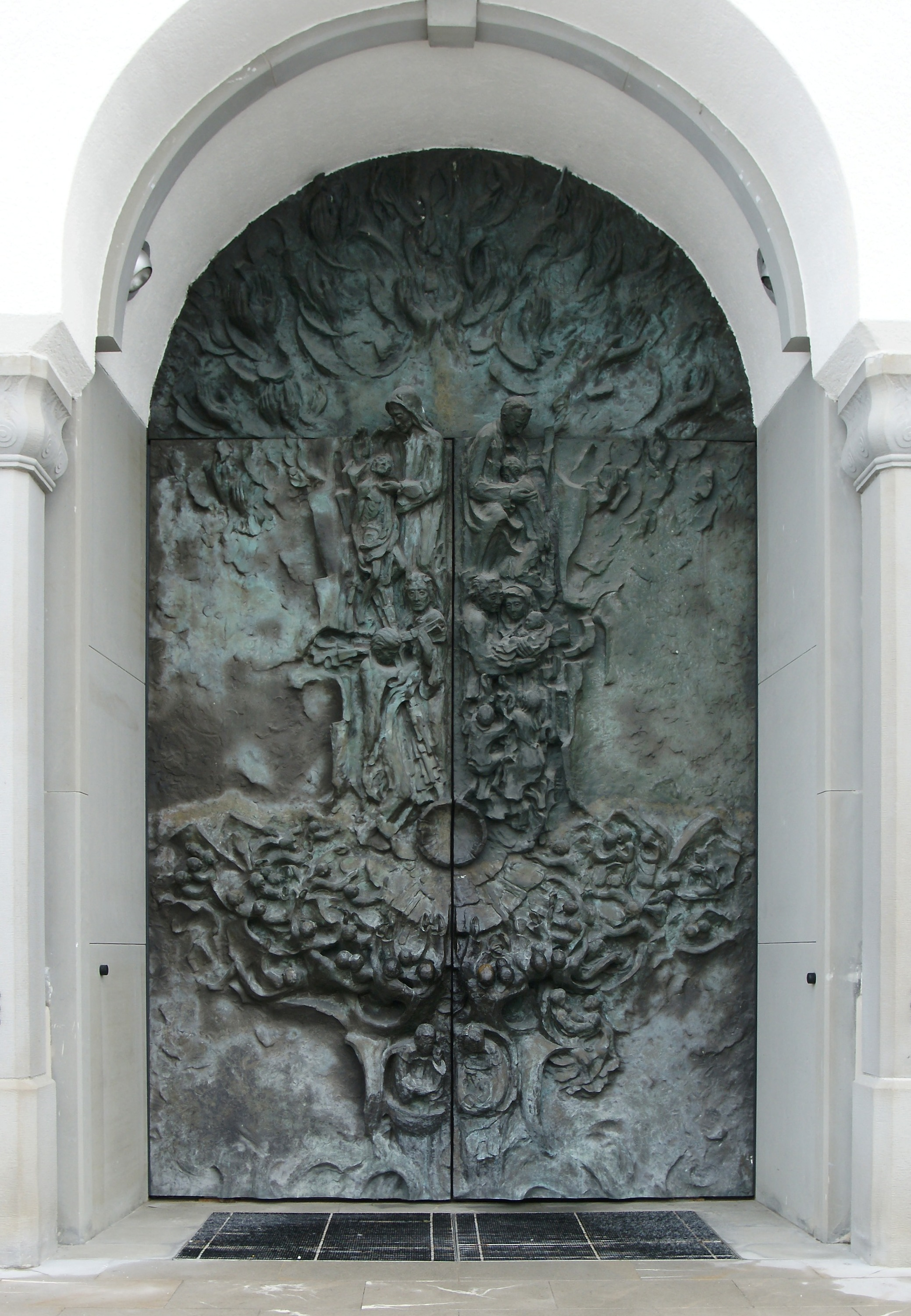 Pfarrkirche St. Martin in Alberschwende im Bregenzerwald. Westportal, Kupferrelief mit Darstellung des Fegefeuers von Engelbert Gitterle 1980.